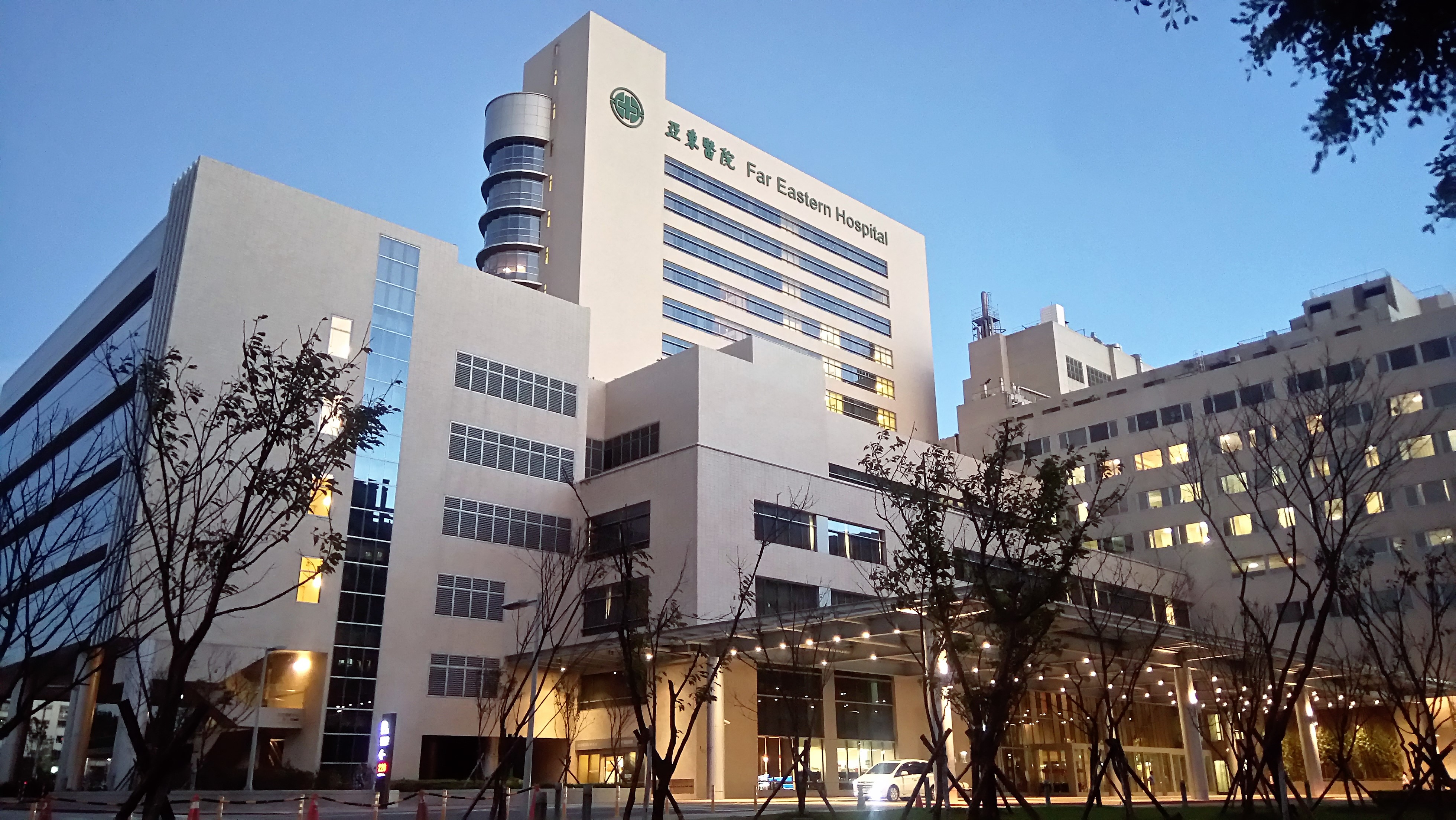 中文（台灣）: 亞東紀念醫院夜景。